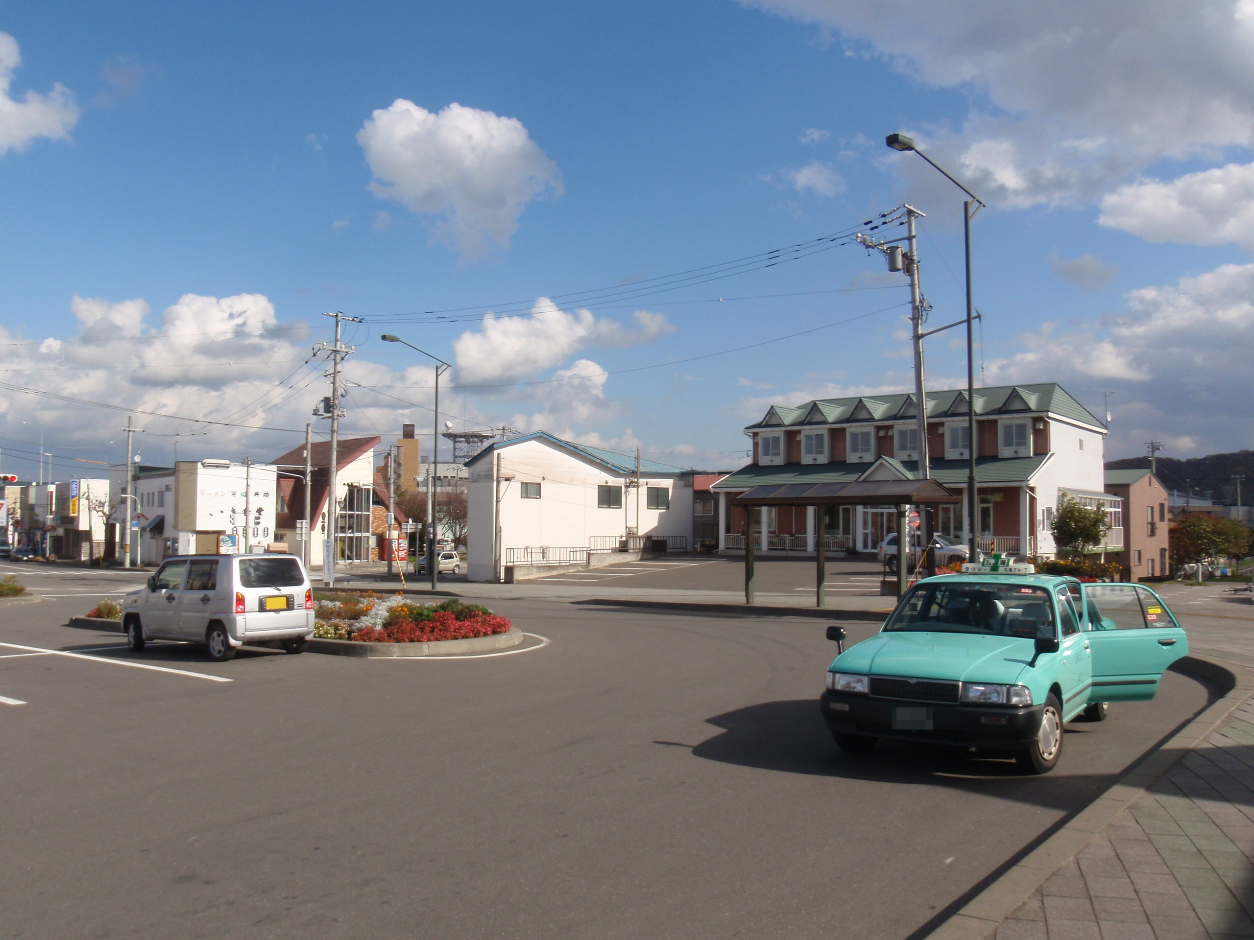 静内の駅前